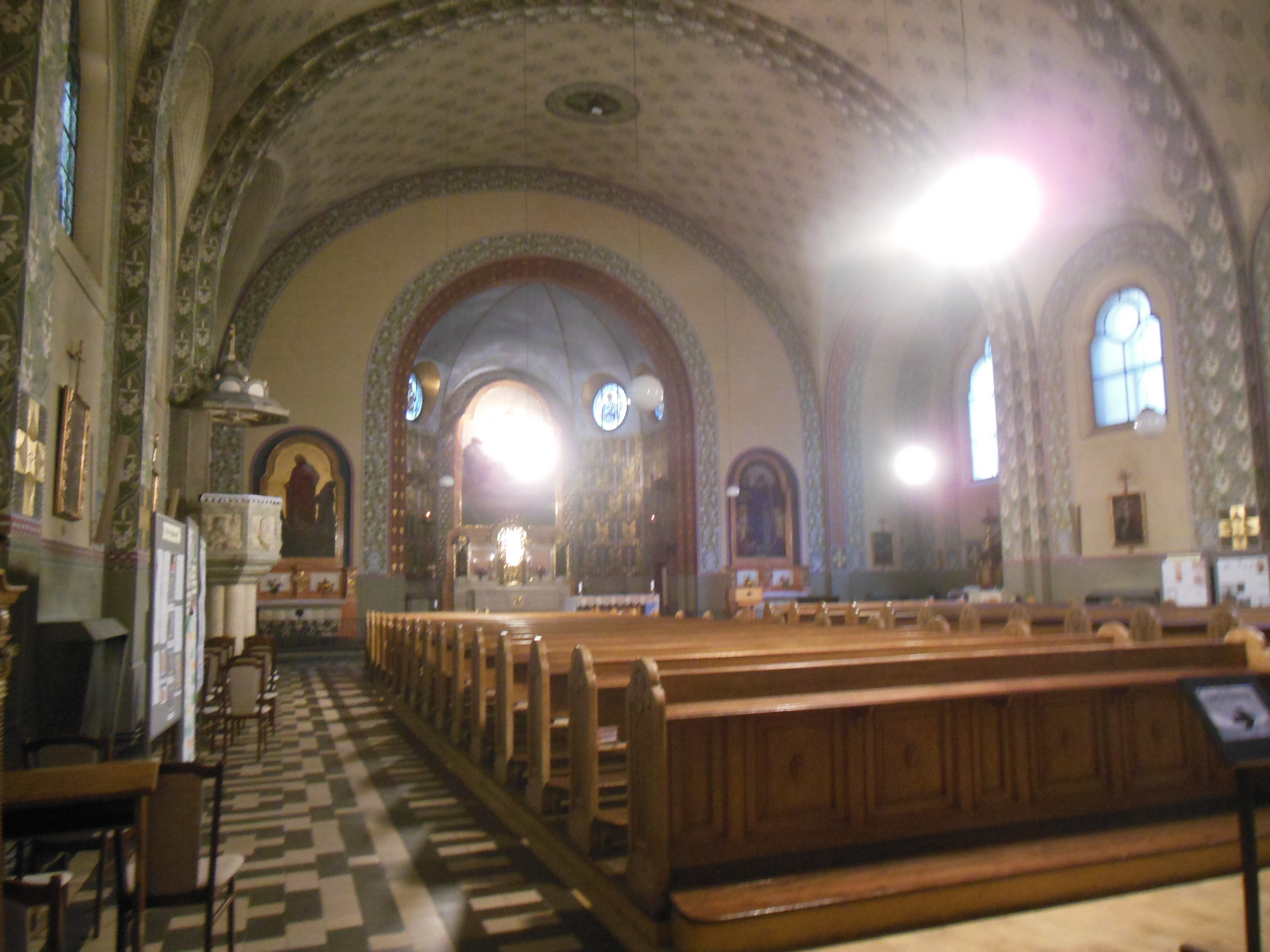 Brno-Trnitá. Ulice Křenová, kostel Neposkvrněného Početí Panny Marie, interiér.